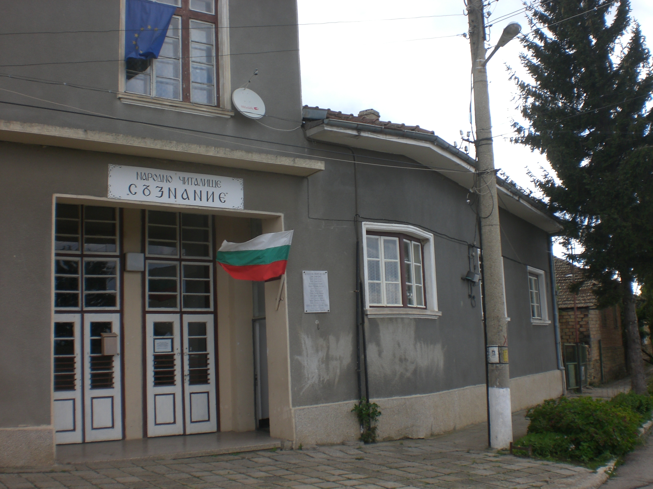 Сградата на Народно читалище "Съзнание" на квартал Сеячи, град Попово - 2007 год. Фото: Пл. Събев.